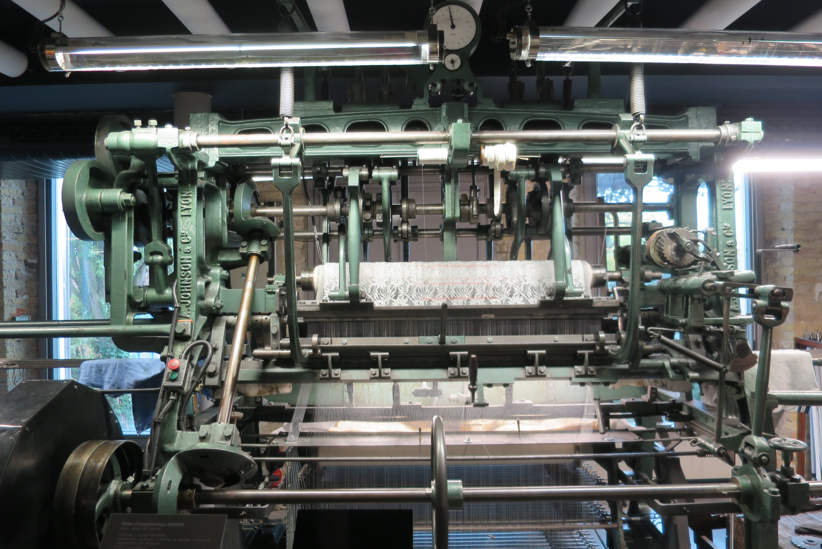 Machine pour fabriquer de la dentelle mécanique